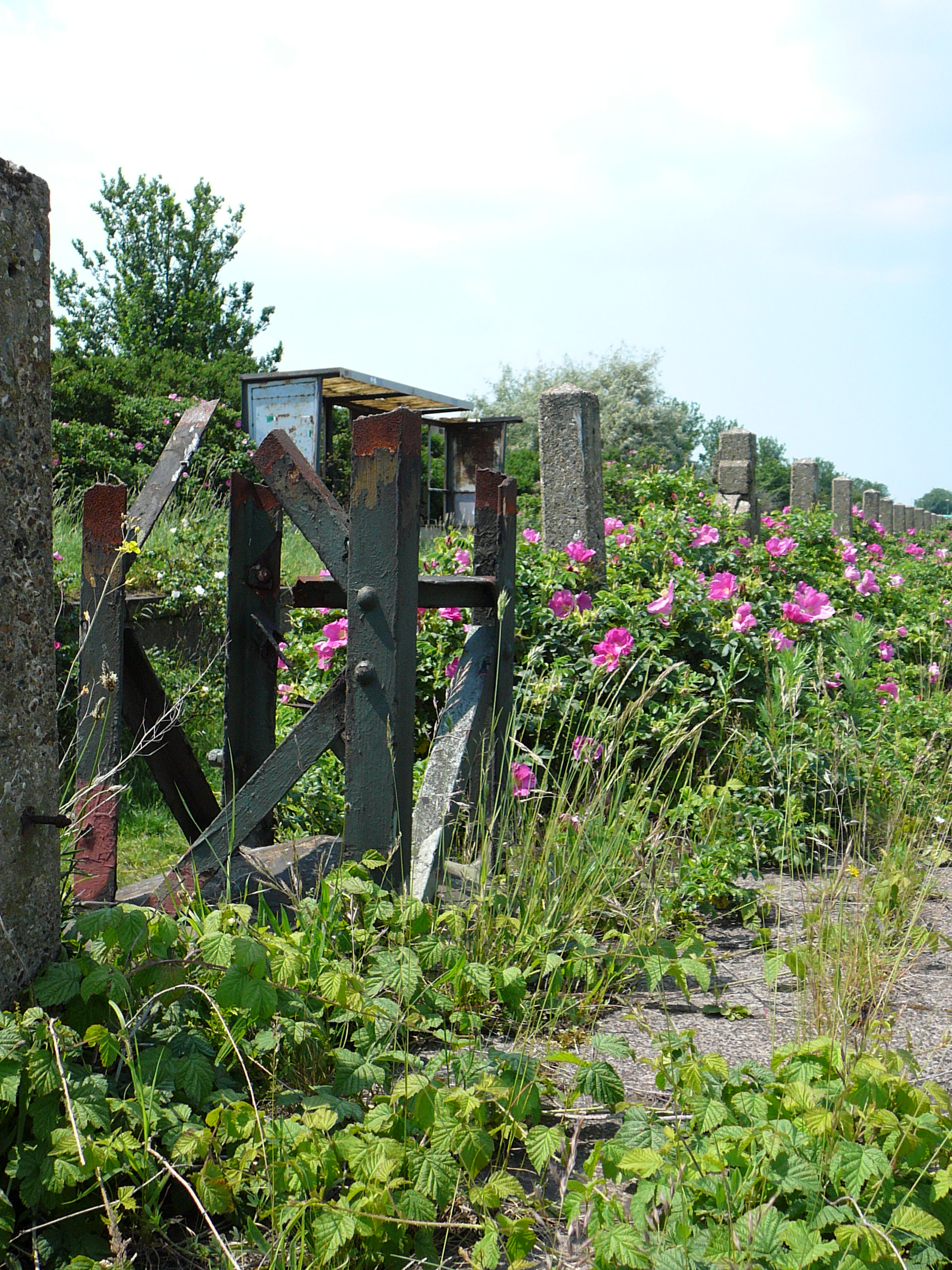 oude bovenleidingsmast aan de IJmondlijn